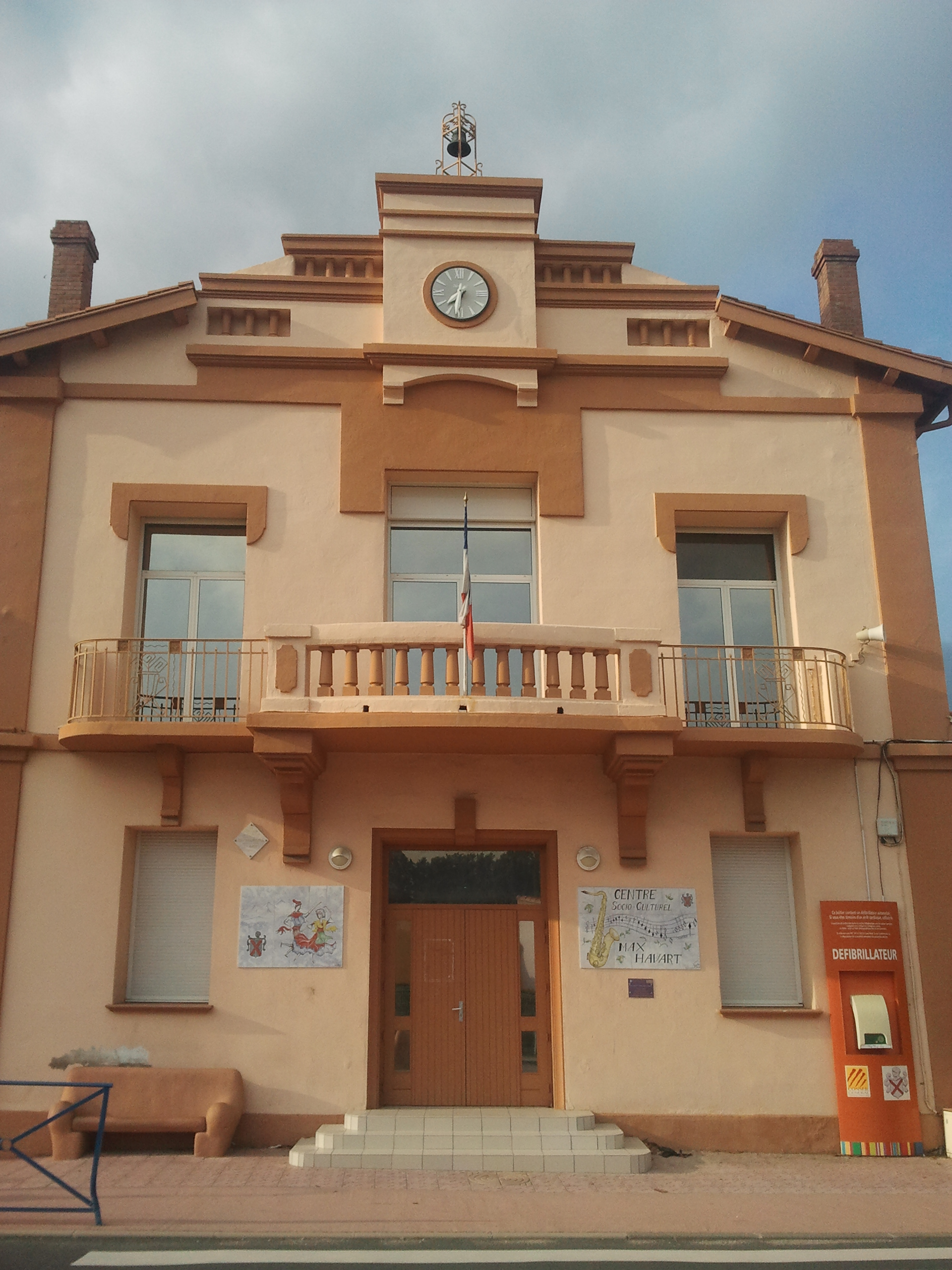 Le centre culturel de Saint-Féliu-d'Avall